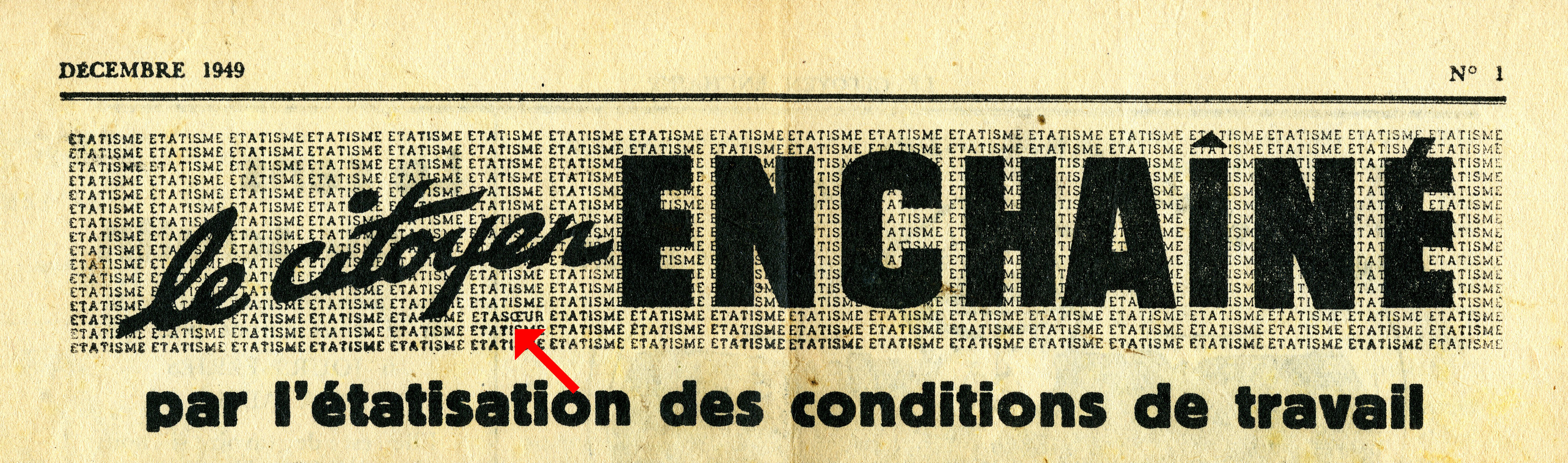 Coquille pirate